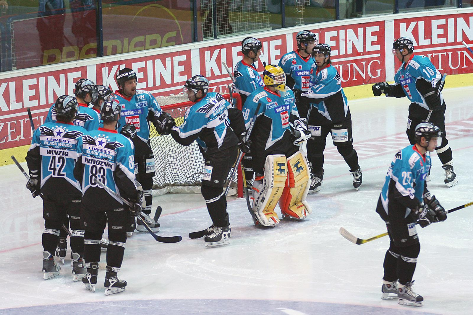 Spieler der Black Wings Linz vor einem Auswärtsspiel gegen den EC VSV versammeln sich rund um Tormann Pavel Nestak.